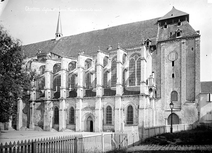 Église Saint-Pierre de Chartres, façade nord, par Mieusement (sans date).